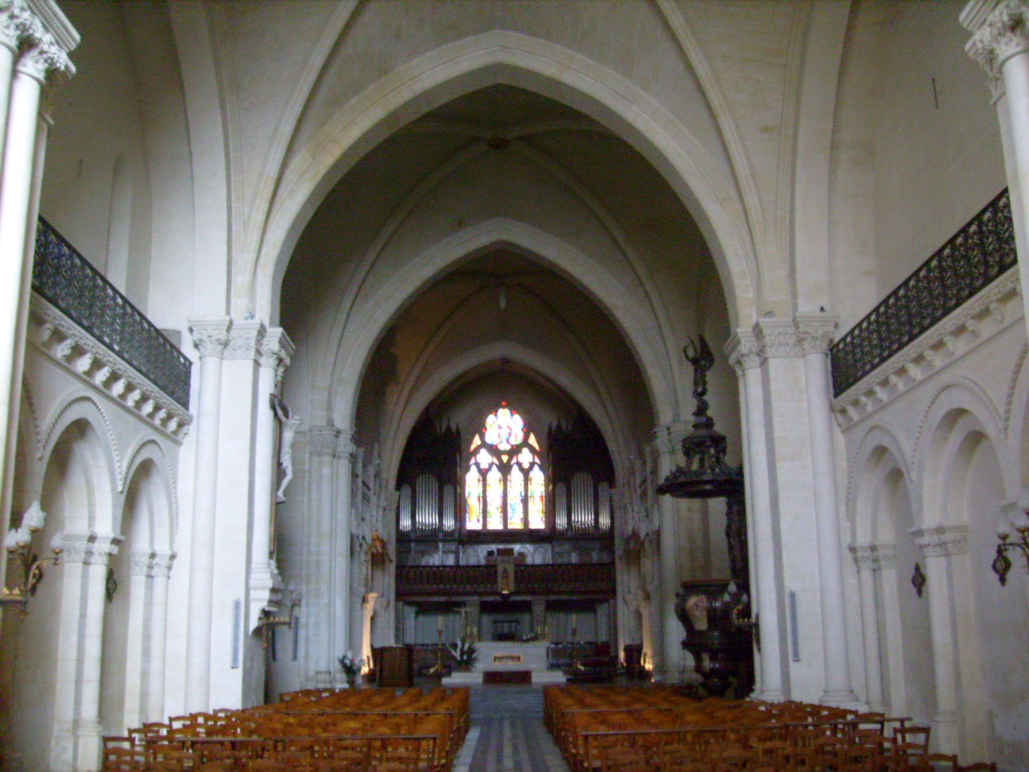 L'intérieur de l'église Saint-Léger, à Cognac, France